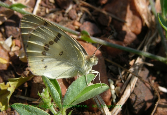 Colotis danae, adult, India